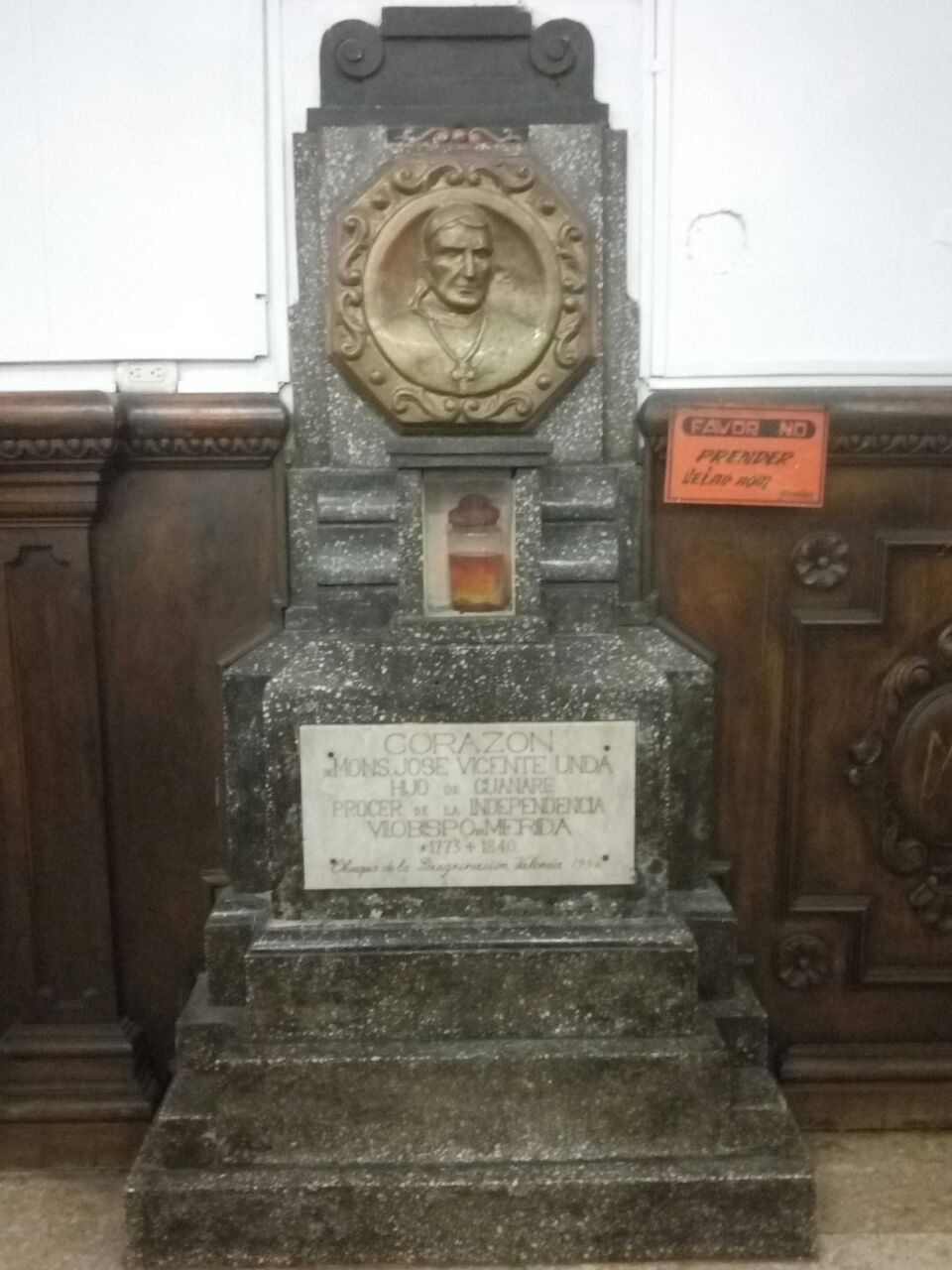 Altar donde reposa el corazón del obispo Monseñor José Vicente de Unda, en la nave izquierda de la iglesia Catedral de su ciudad natal Guanare.